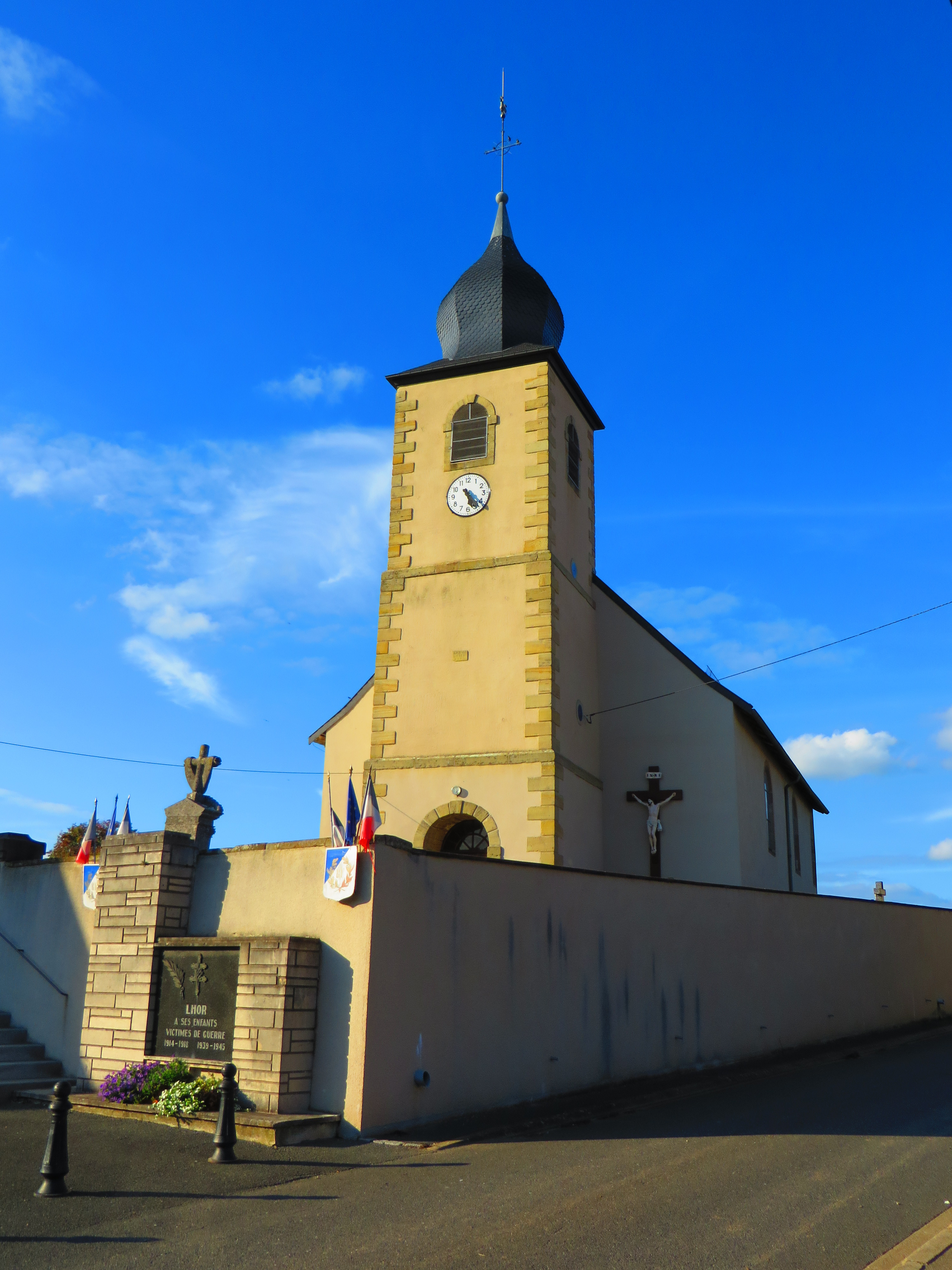 Lhor l'église Saint-Pierre-aux-Liens